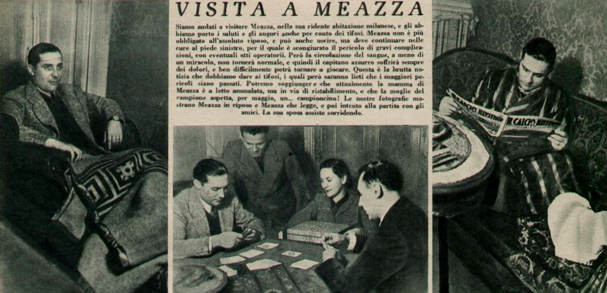 Visita a Meazza